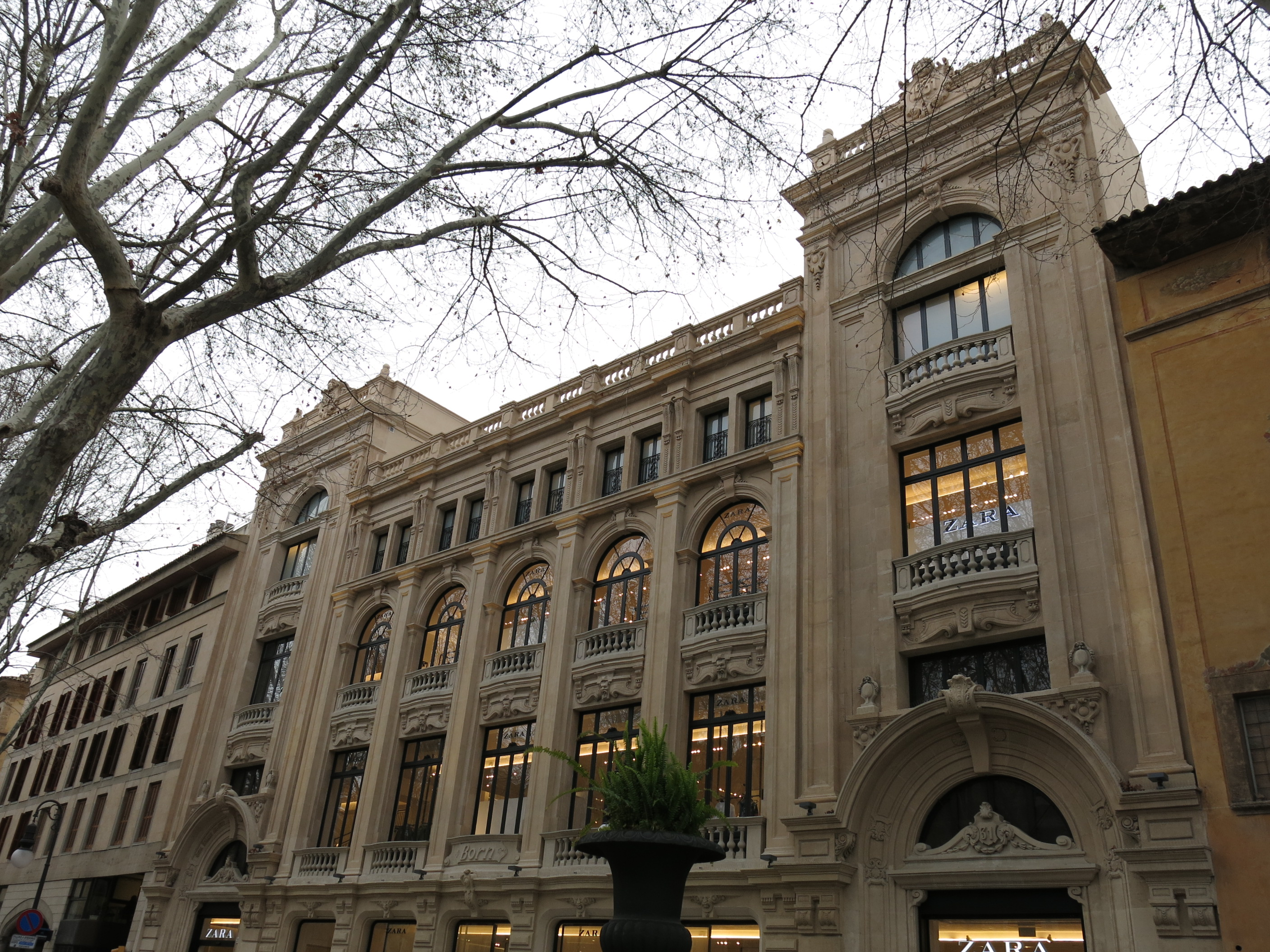 Magatzems Zara, antiga Sala Born, passeig del Born 25 (Palma). En la remodelació com a magatzems, al soterrani s'hi va trobar un refugi antiaeri de la guerra civil.